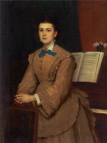 Abelone "Lona" Birgitte baroness Gyldenkrone, née Gulowsen (1848-1934), Norwegian opera singer